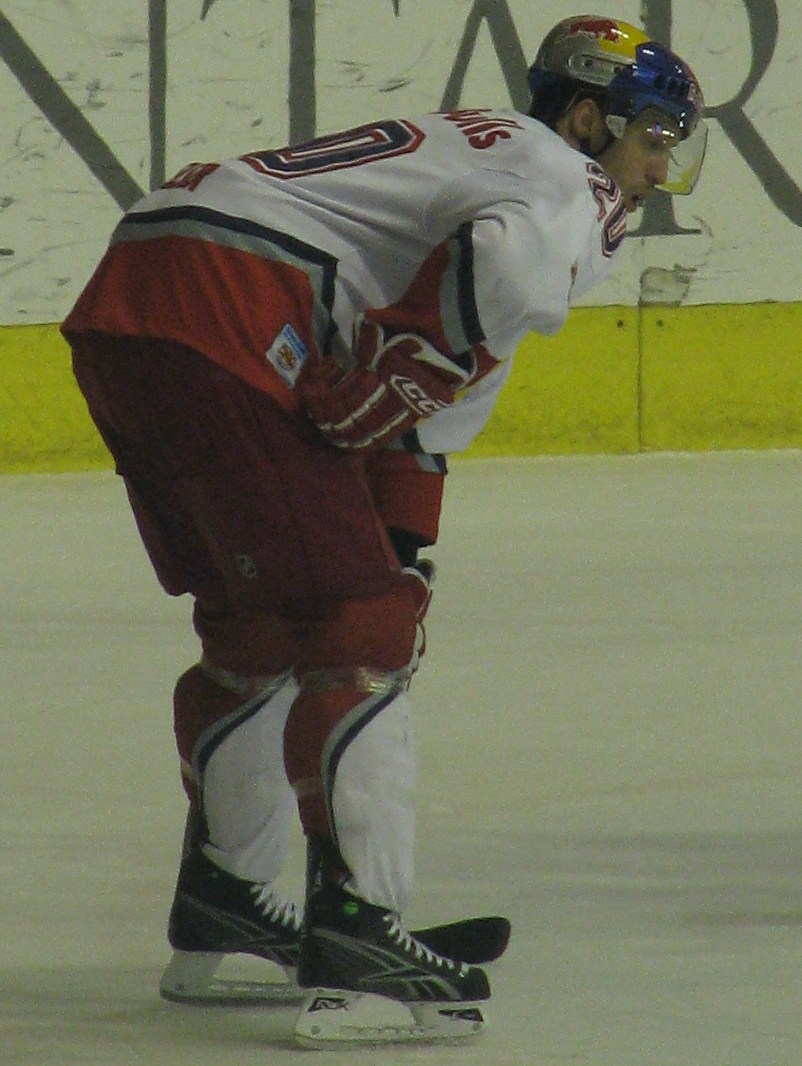 Daniel Welser